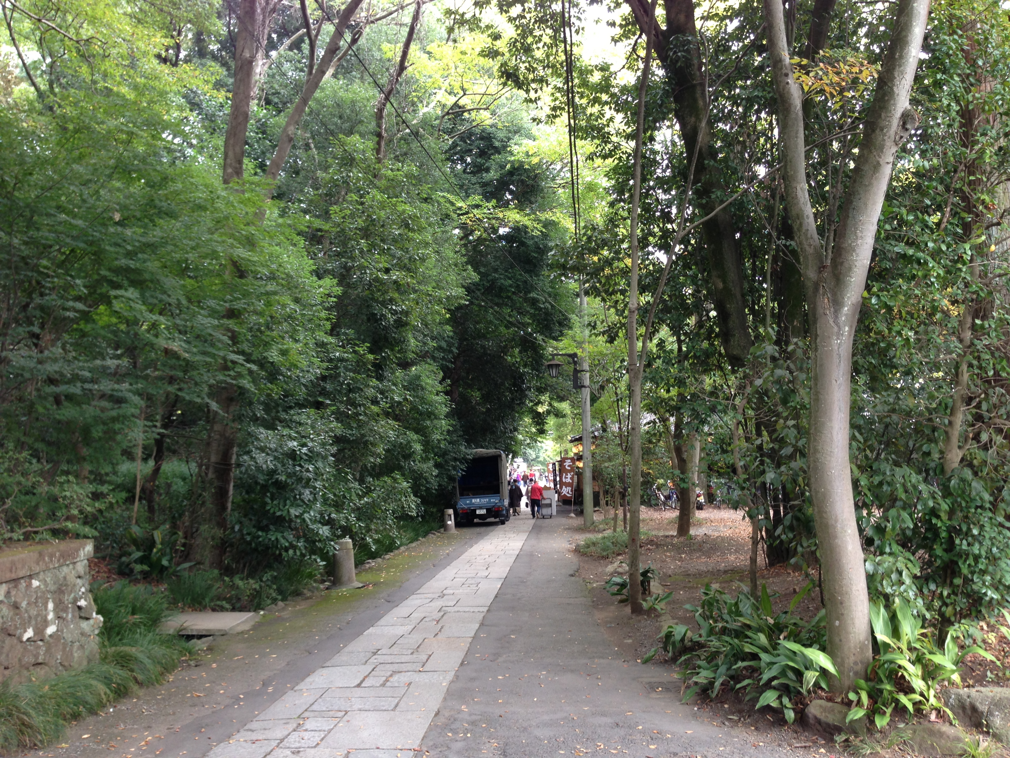 5 Chome Jindaiji Motomachi, Chōfu-shi, Tōkyō-to 182-0017, Japan